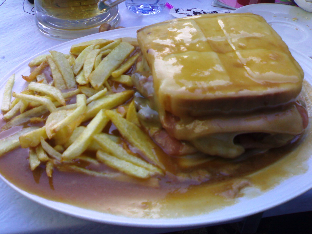 Francesinha, prato típico do Porto